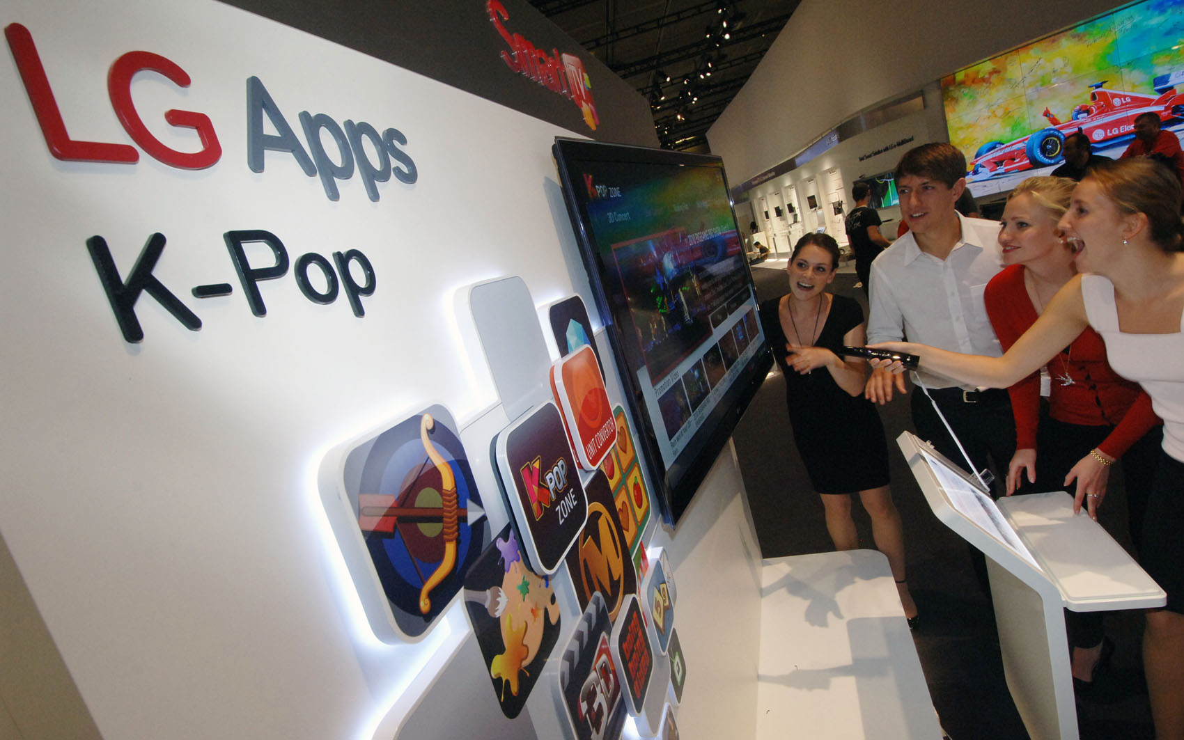 LG전자가 독일 베를린에서 열린 유럽 최대 가전전시회 `IFA 2011`에서 LG 시네마 3D 스마트TV의 'K-POP Zone'서비스를 통해 한국 문화를 관람객들에게 소개하고 있다. ※ LG전자 뉴스룸 에서 관련 보도자료를 확인실 수 있습니다.